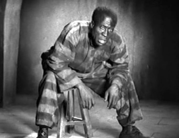 Кадр из фильма Льва Кулешова "Великий утешитель" (1933)